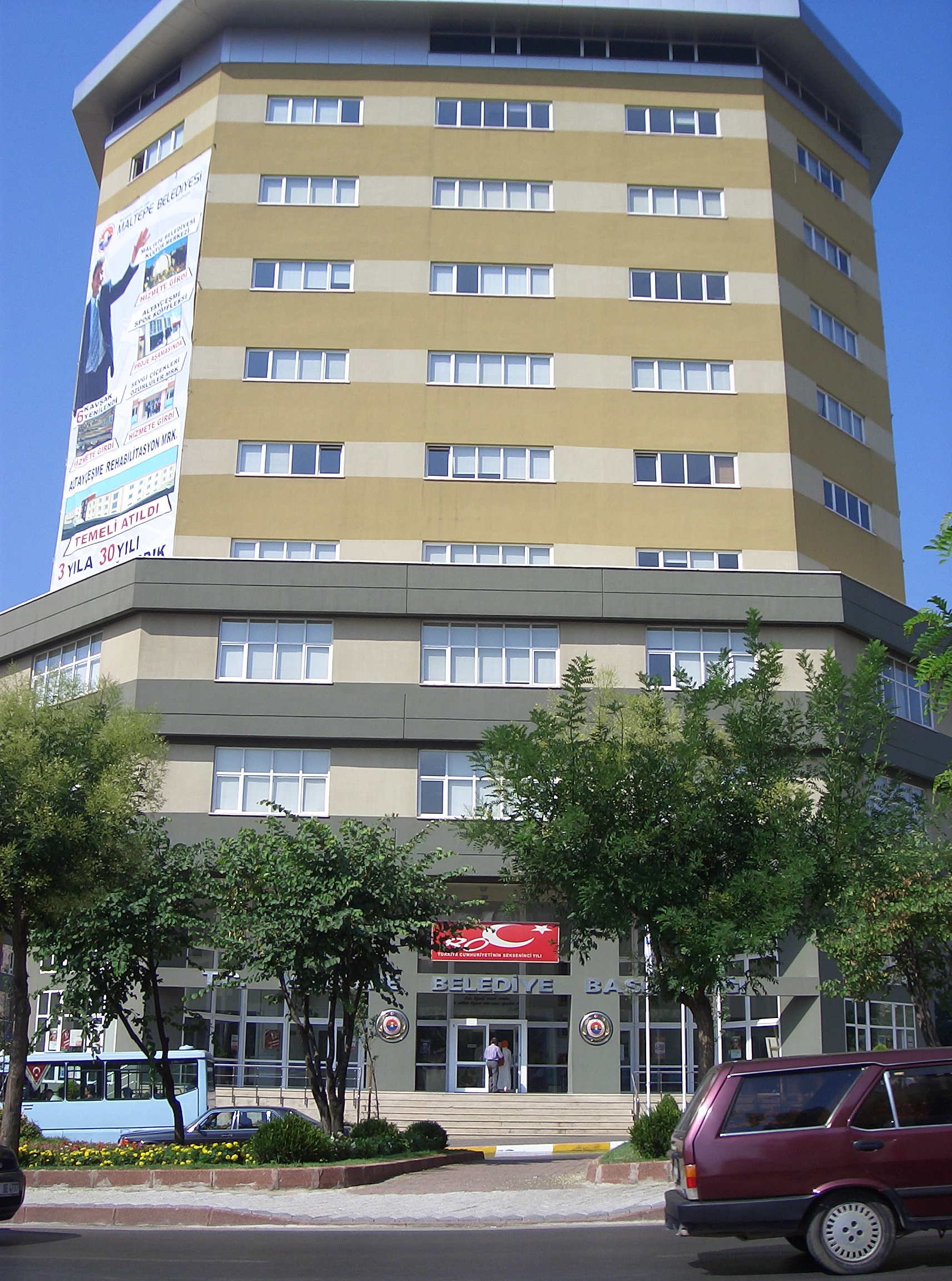 Kategori:İstanbul resimleri